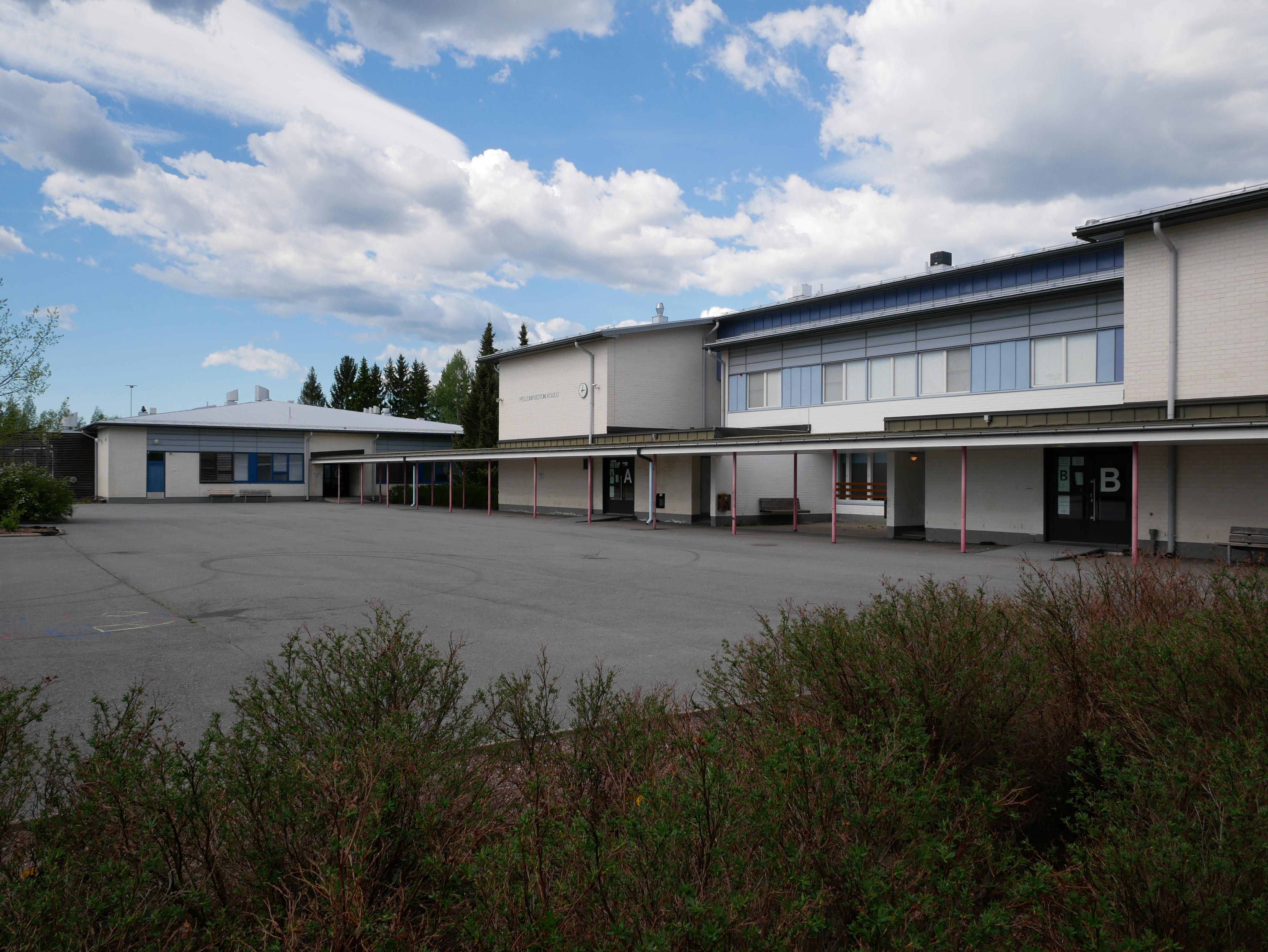 Huittisissa sijaitseva Pellonpuiston peruskoulu.